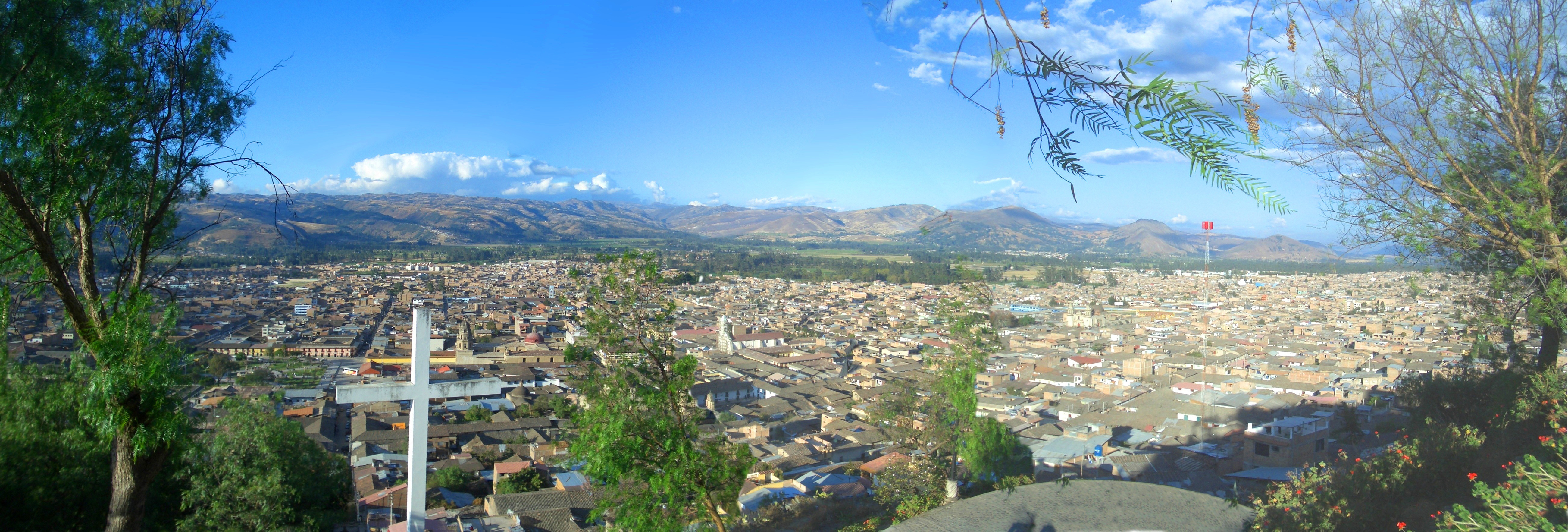 View on Cajamarca (Peru)